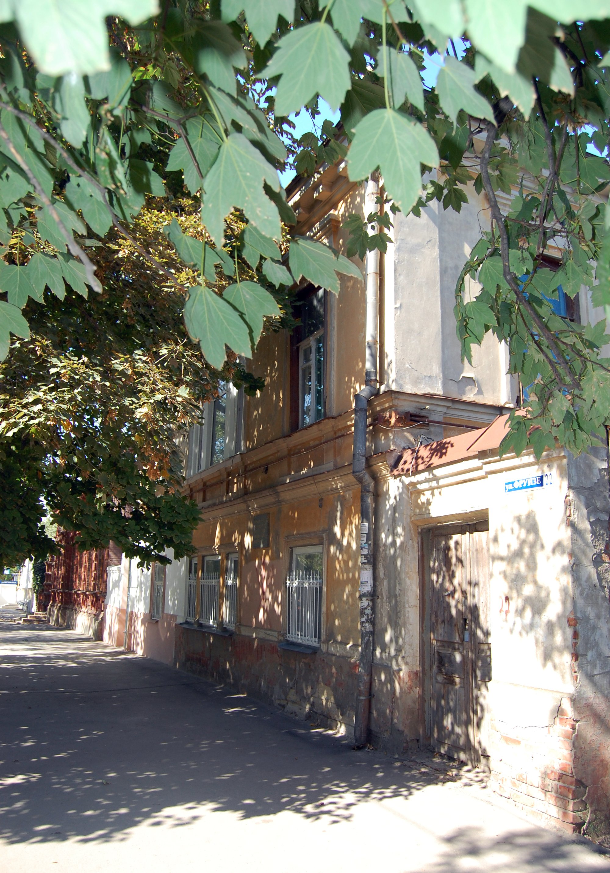 Фасад особняка "Дом Дросси", Таганрог, 2012